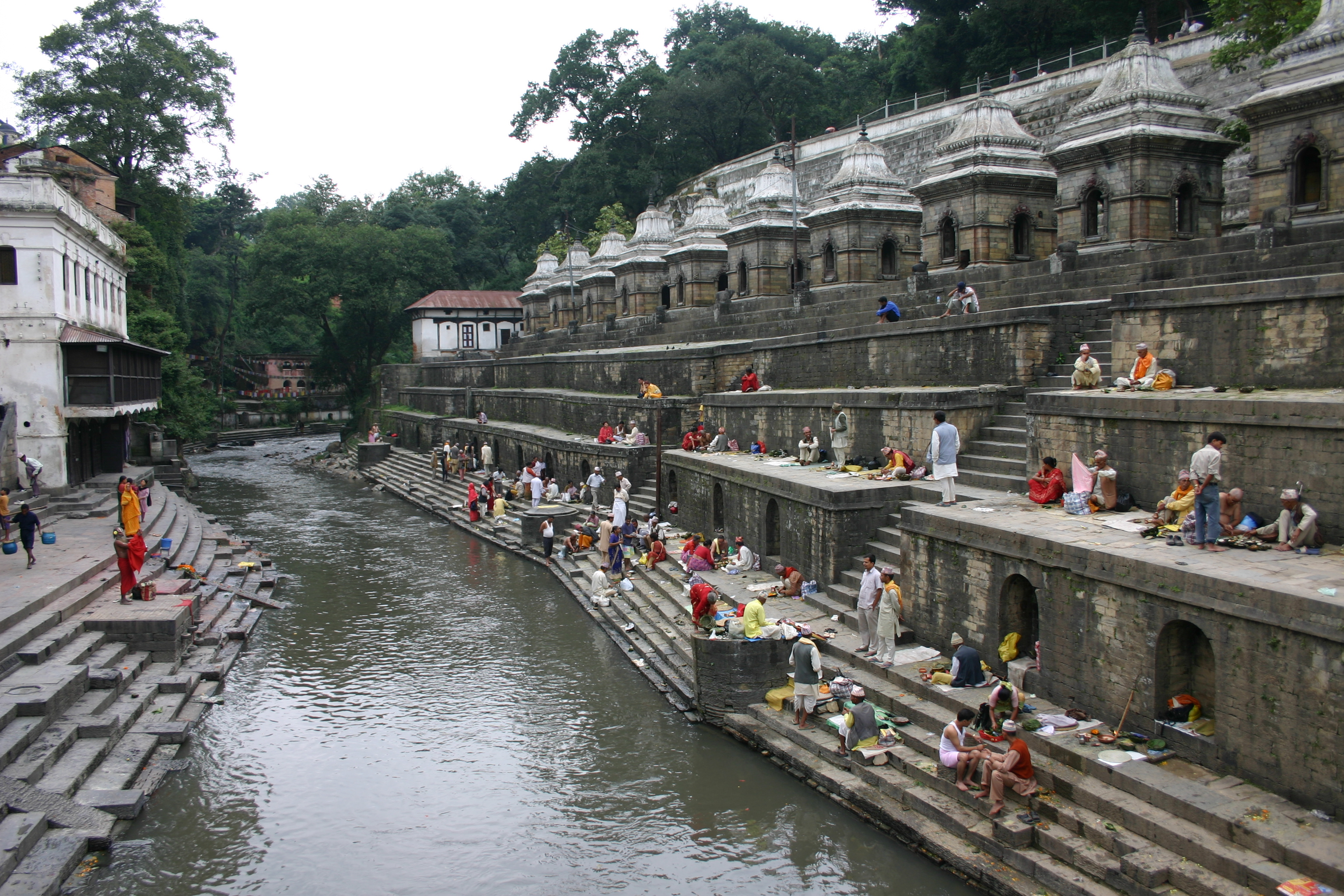 Pashupatinath in Kathmandu (Nepal)